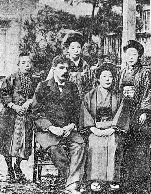 東京で撮影された、内村鑑三の写真。長男、長女、夫人、女中と共に